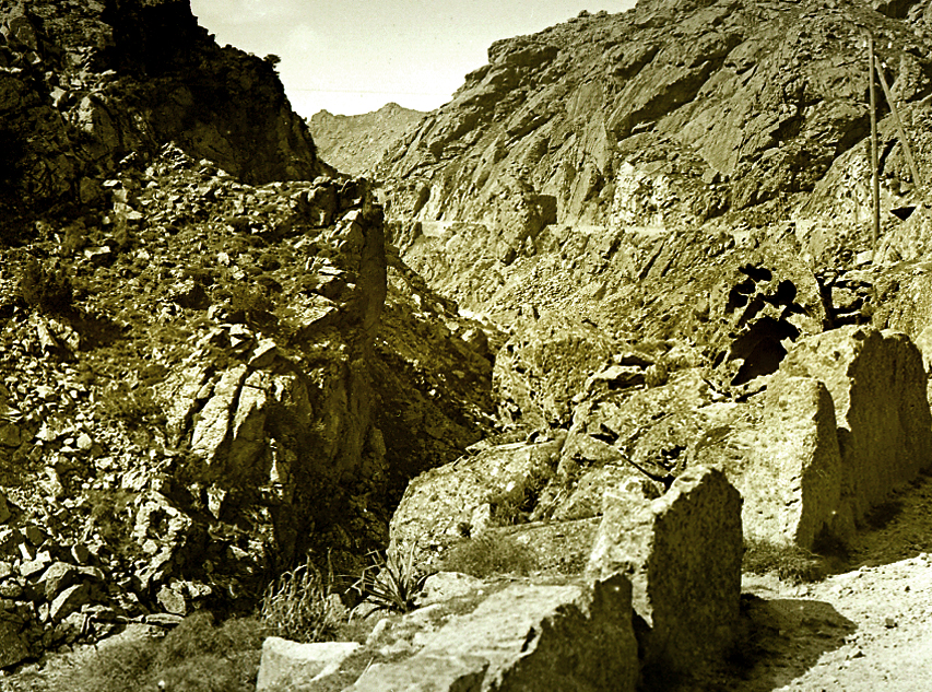 Corscia (Corse) - La Scala di Santa Regina au début du XXe siècle